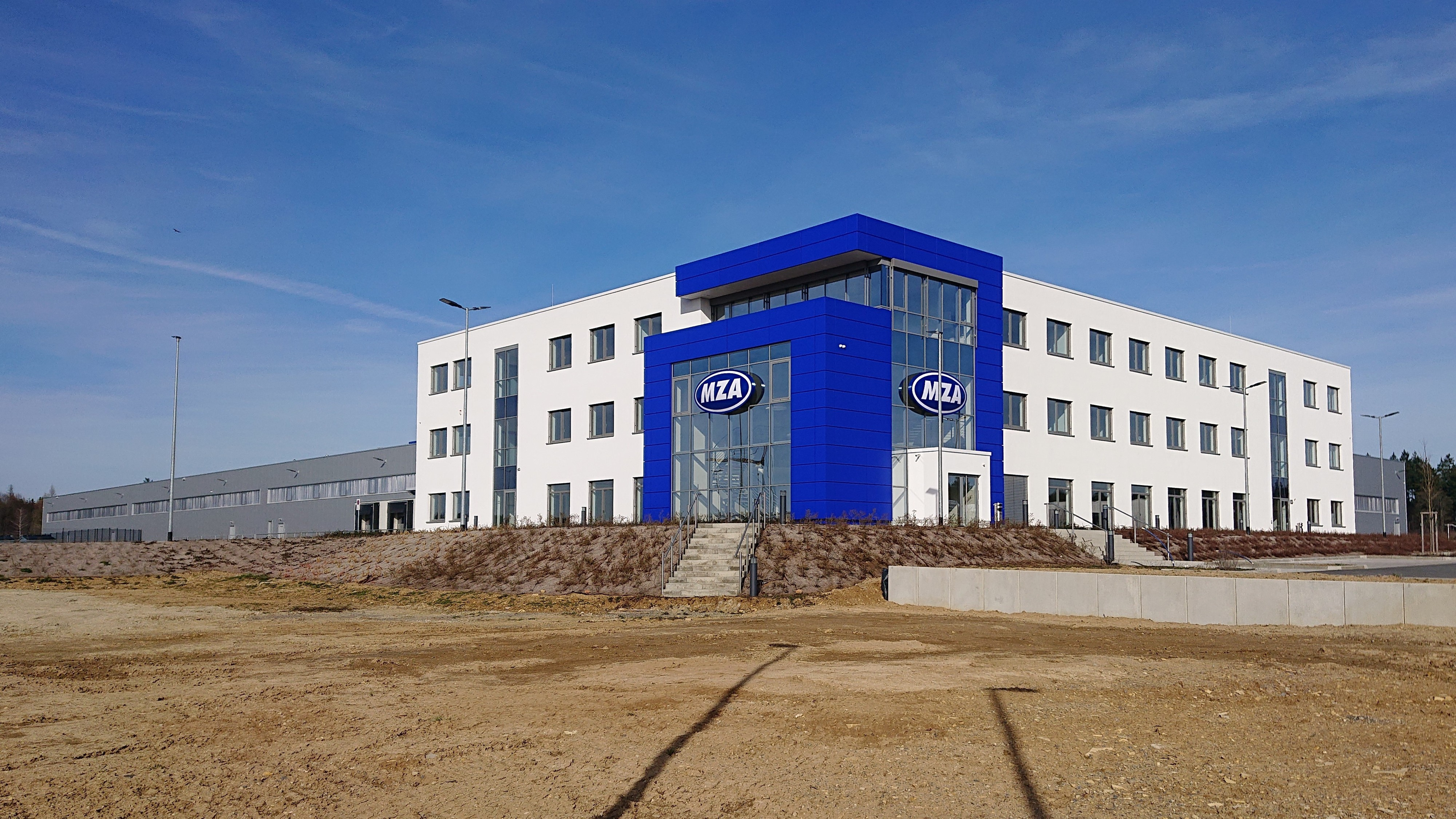 Firma MZA im Industriegebiet Rohrer Berg in der Kreisstadt Meiningen.